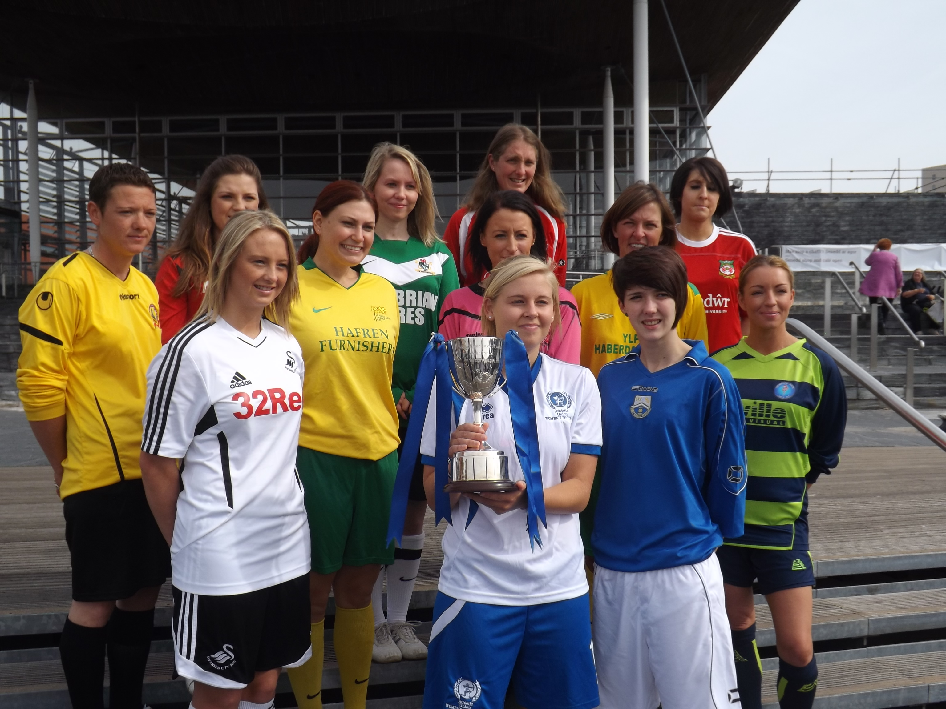 The Presiding Officer sponsors the launch at the Senedd / Y Llywydd yn noddi'r lansiad yn y Senedd